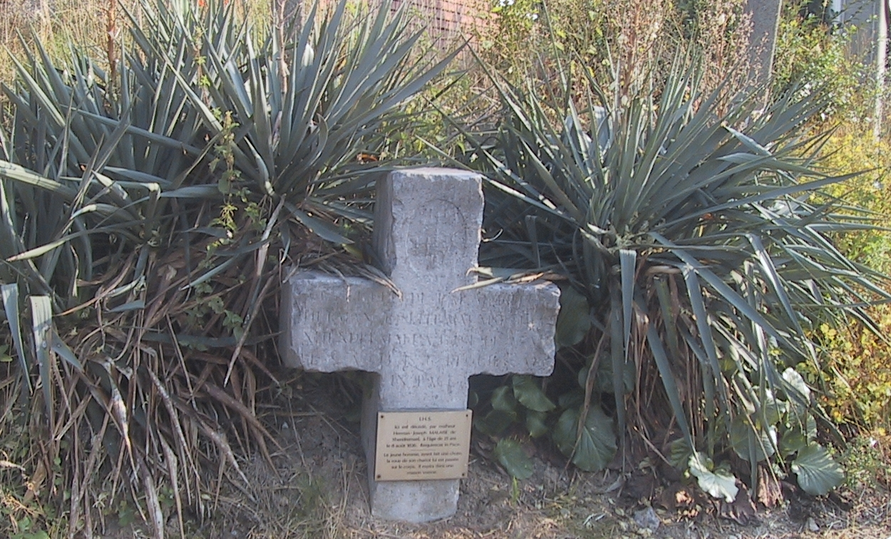 Croix d'Occis à Xhendremael, Alleur, Belgique